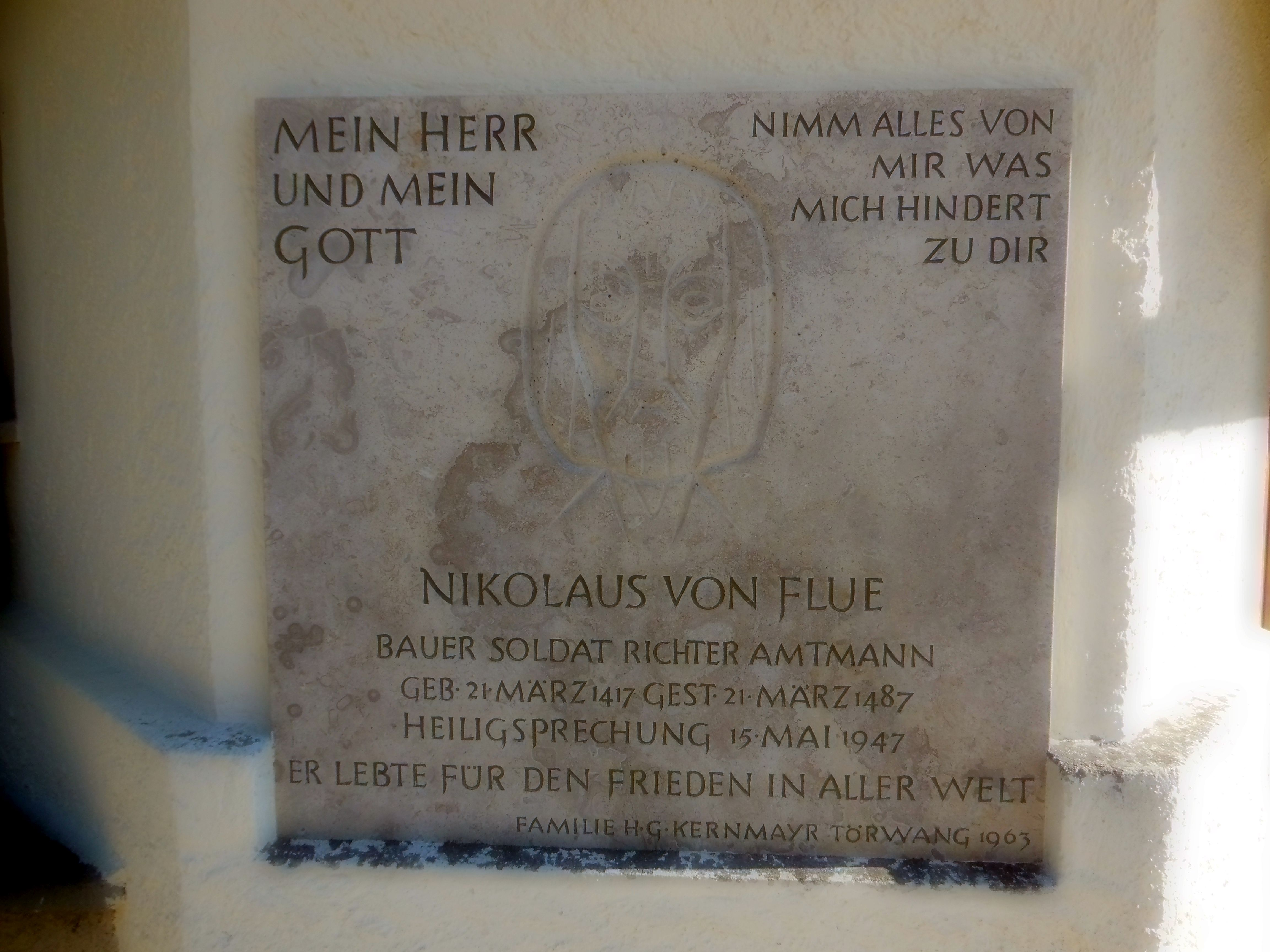 Gedenktafel an Nikolaus von Flüe an der Pfarrkirche in Törwang